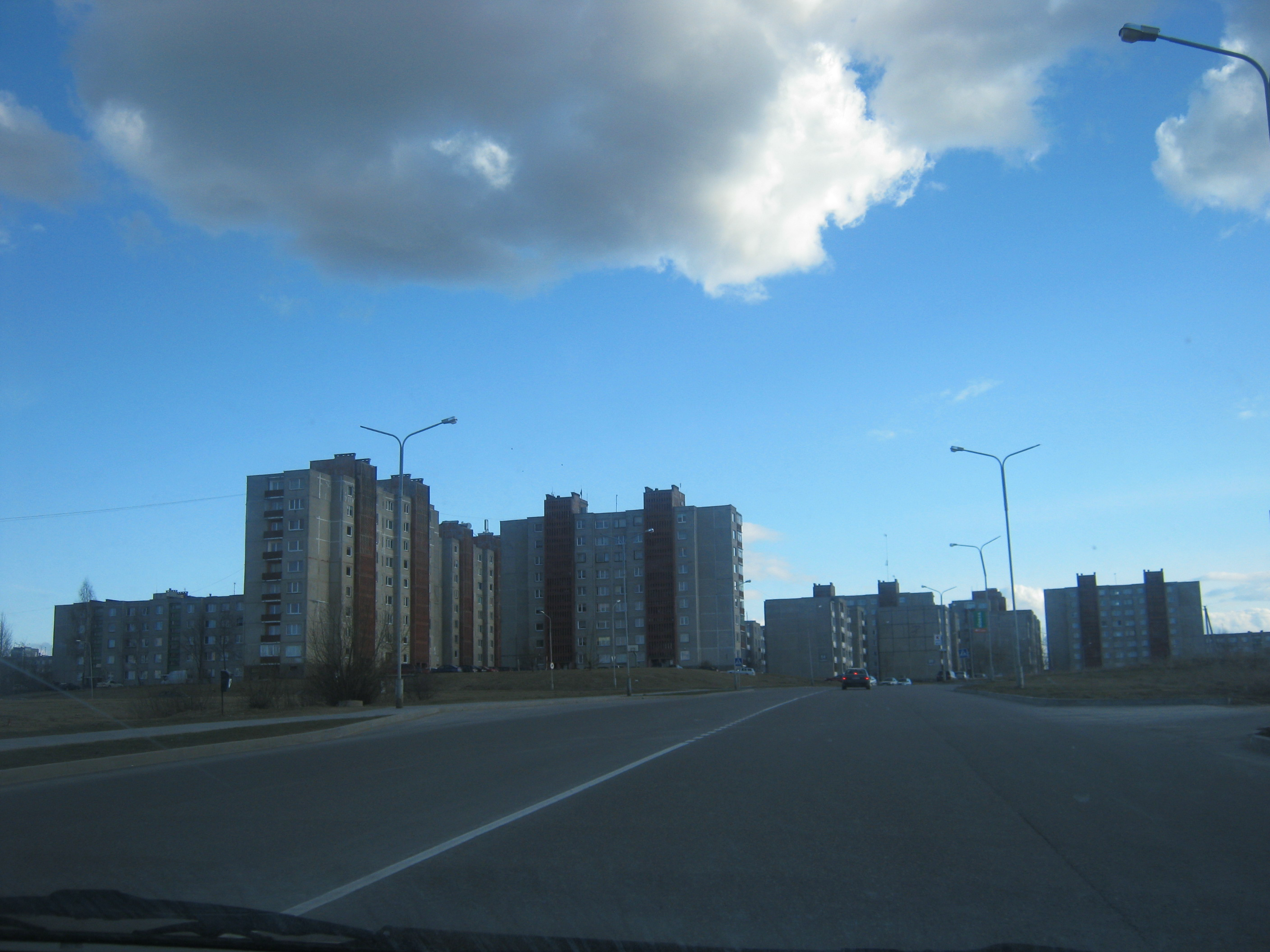 Jonava